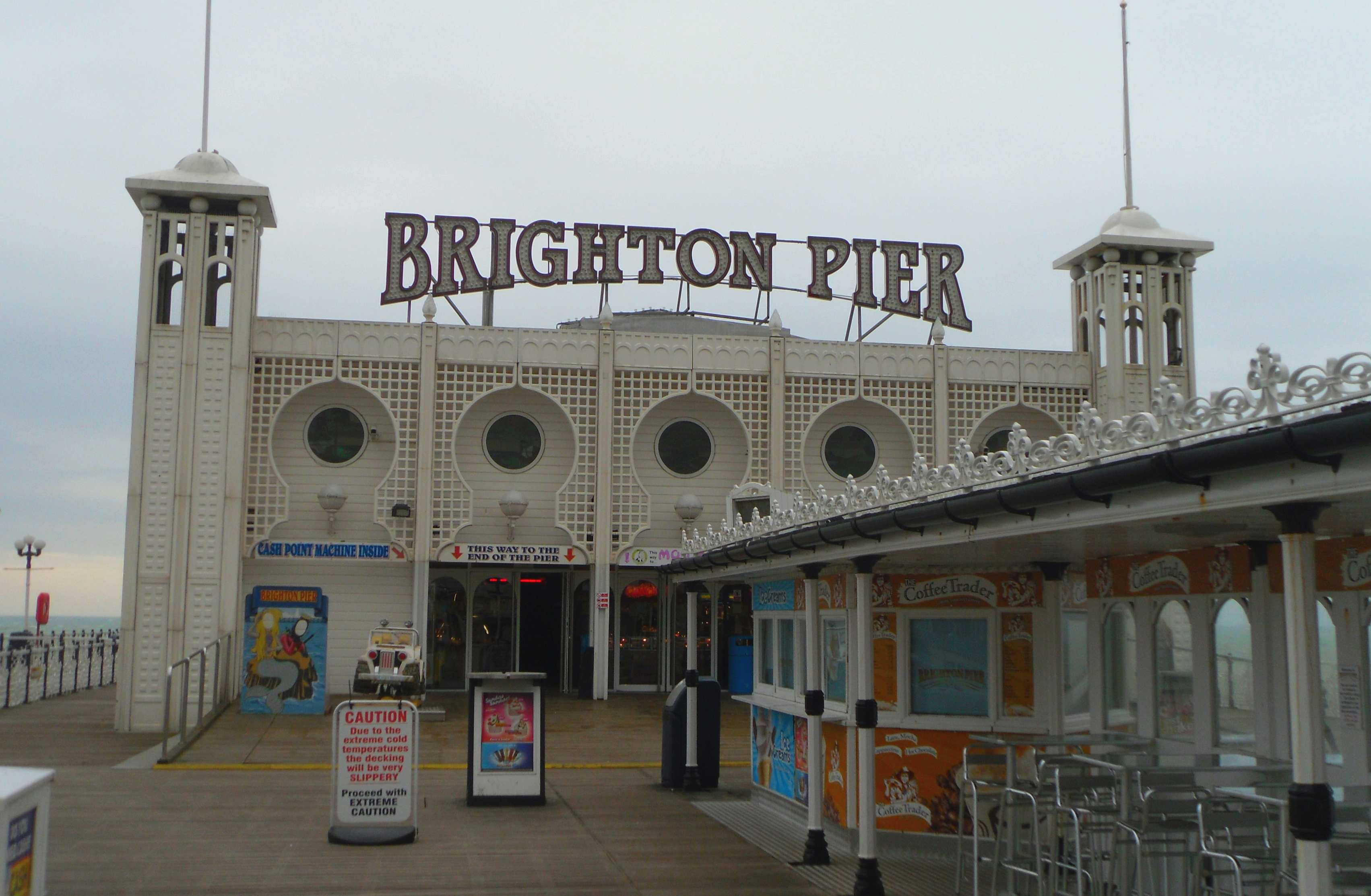 Brighton Piers